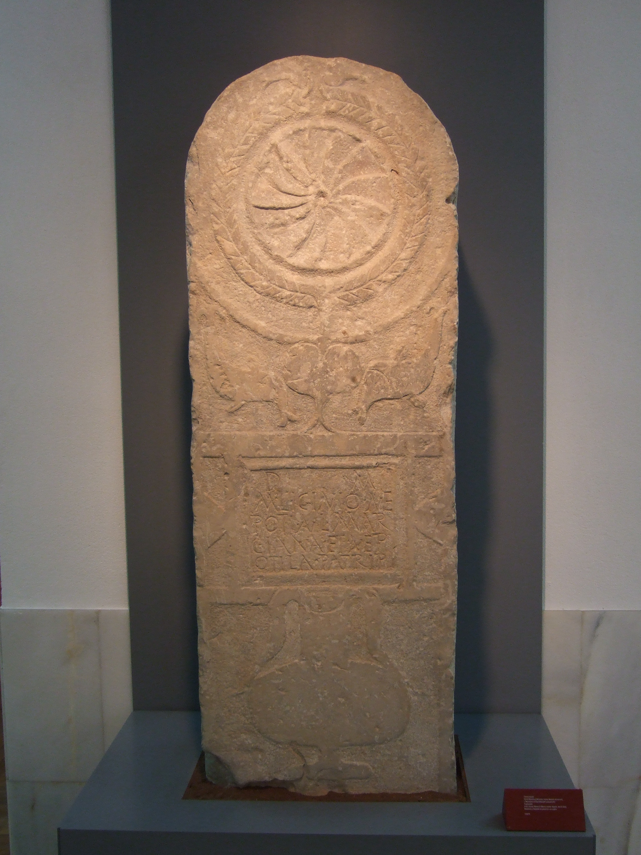 Estela funeraria romana procedente de Uxama (Burgo de Osma, Soria), correspondiente con la inscripción CIL II 6338, cuyo texto se desarrolla como: D(is) M(anibus)/ M(arco) LICINIO NE/POTI AN(norum) L MAR/CIANA ET NEP/OTILA PATRI P(oserunt). "A los dioses Manes. A Marco Licinio Nepote, de 50 años. Marciana y Nepotila la pusieron a su padre."; se conserva en el Museo Numantino. s. II a. C.